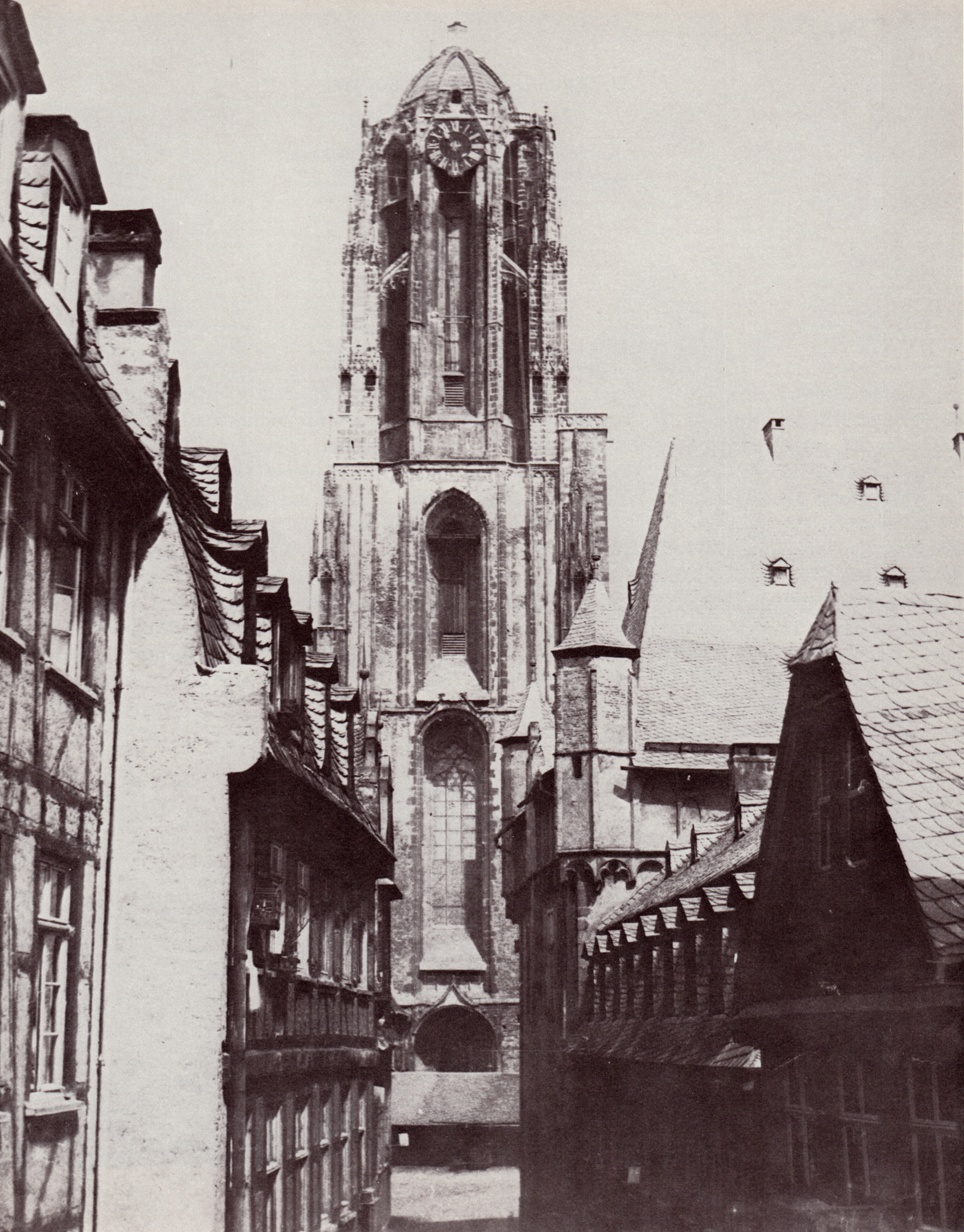 Der Frankfurter Dom von Süden (Westturm des Doms und Straße Am Schlachthaus. Blick aus einem Obergeschoss des ehemaligen Schlachthauses am Metzgertor in Richtung Weckmarkt und die Südseite des Domturms. Rechts mit Zinnen und Ecktürmchen das Leinwandhaus.)